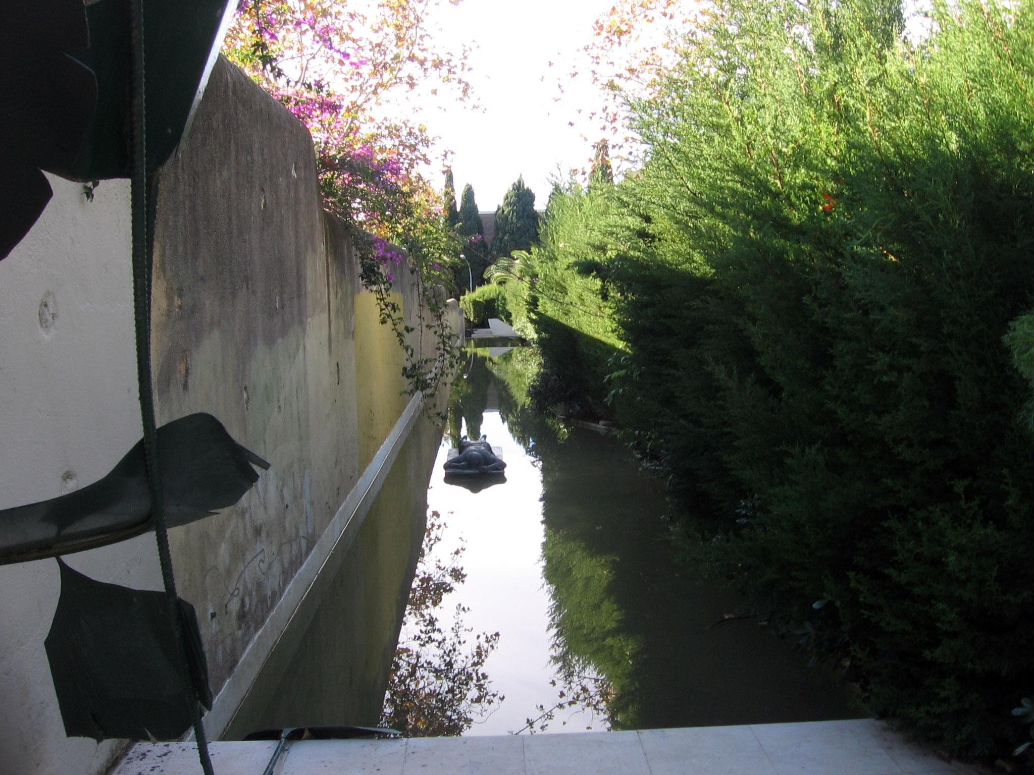 Jardines de Villa Cecilia.